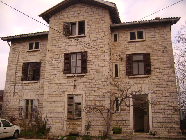 Zgrada kolodvora u Bujama na trasi "Parenzane"